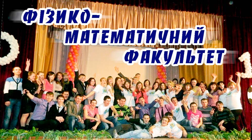 Зроби правильний вибір